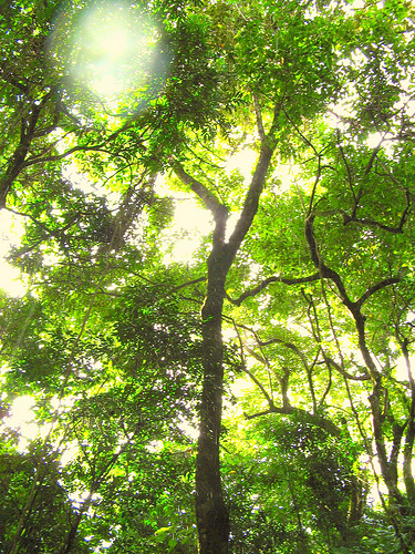 pau pereira tree